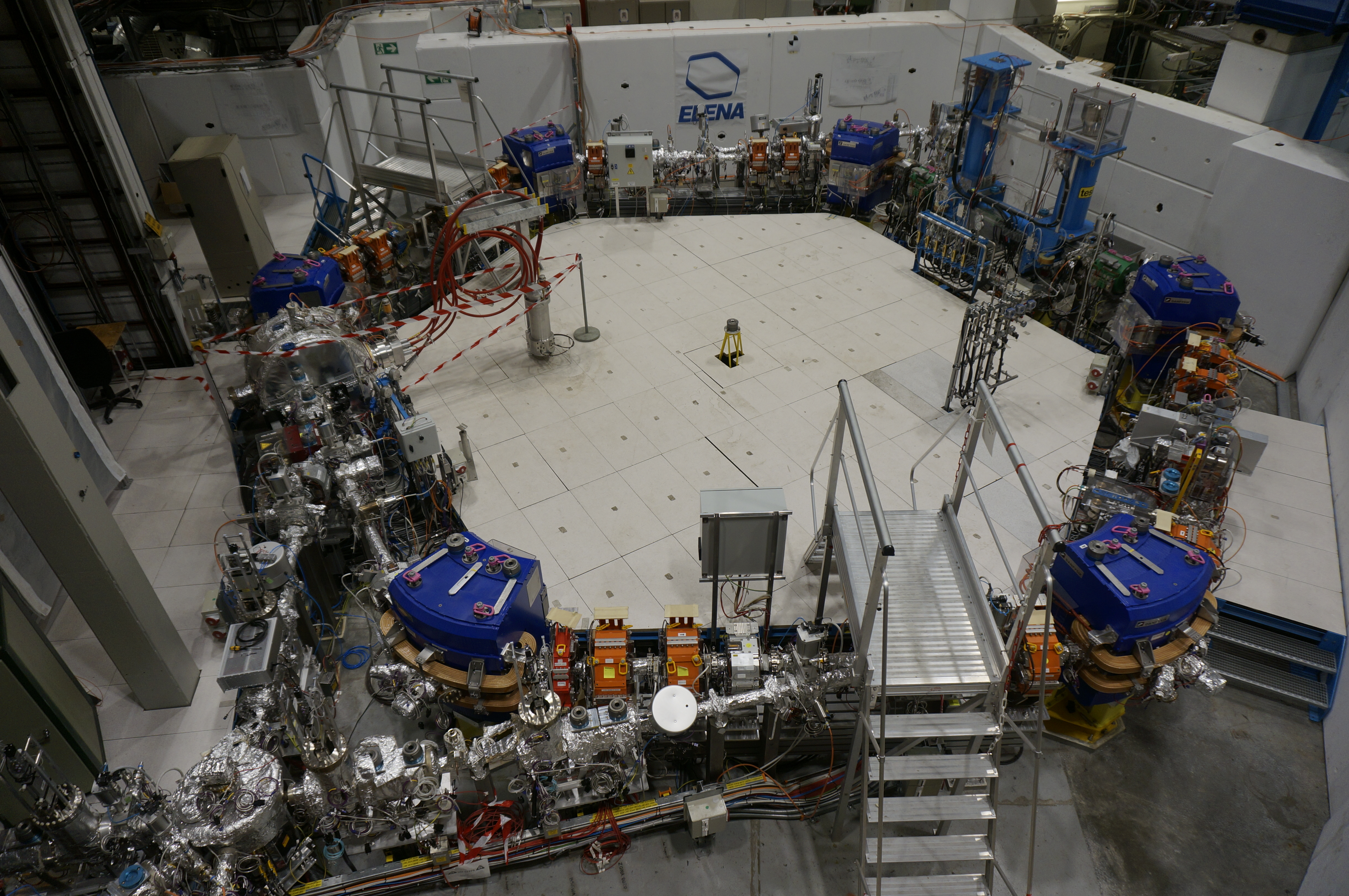 Expérience ELENA